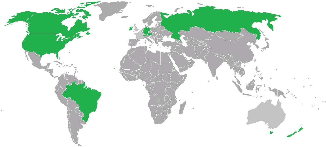 Português do Brasil: adult swim pelo mundo.